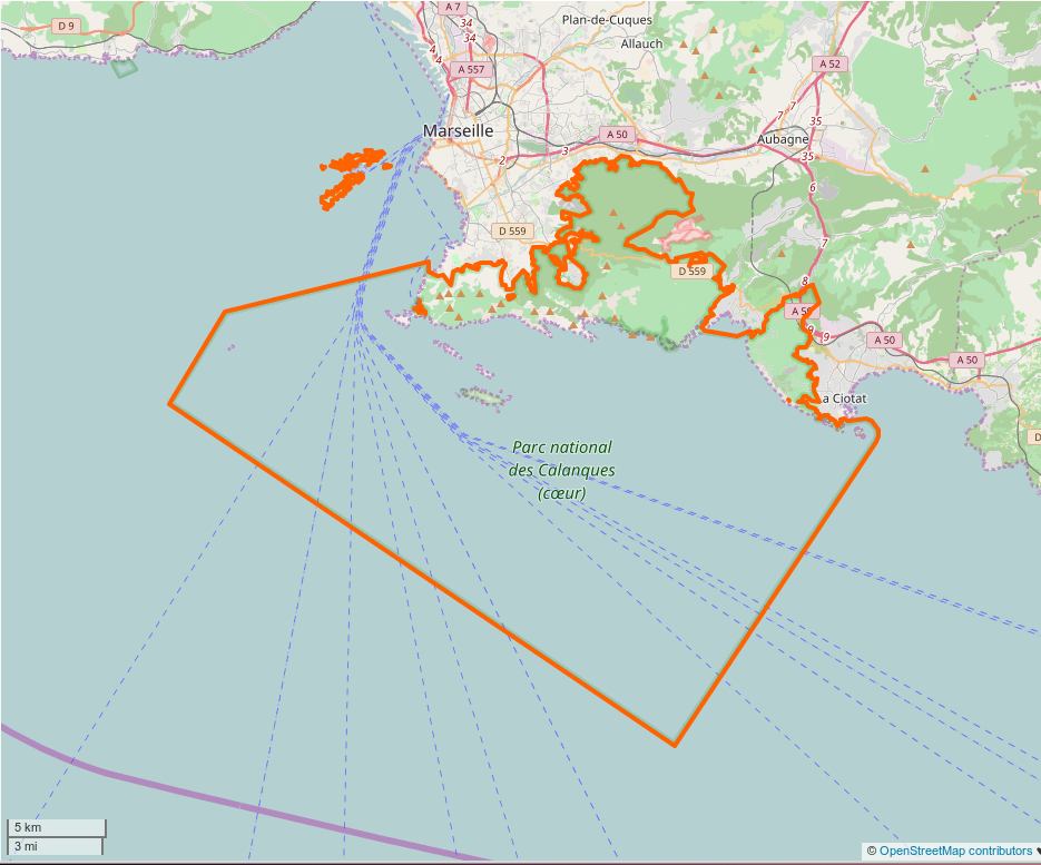 Périmètre du coeur de parc du Parc national des Calanques.